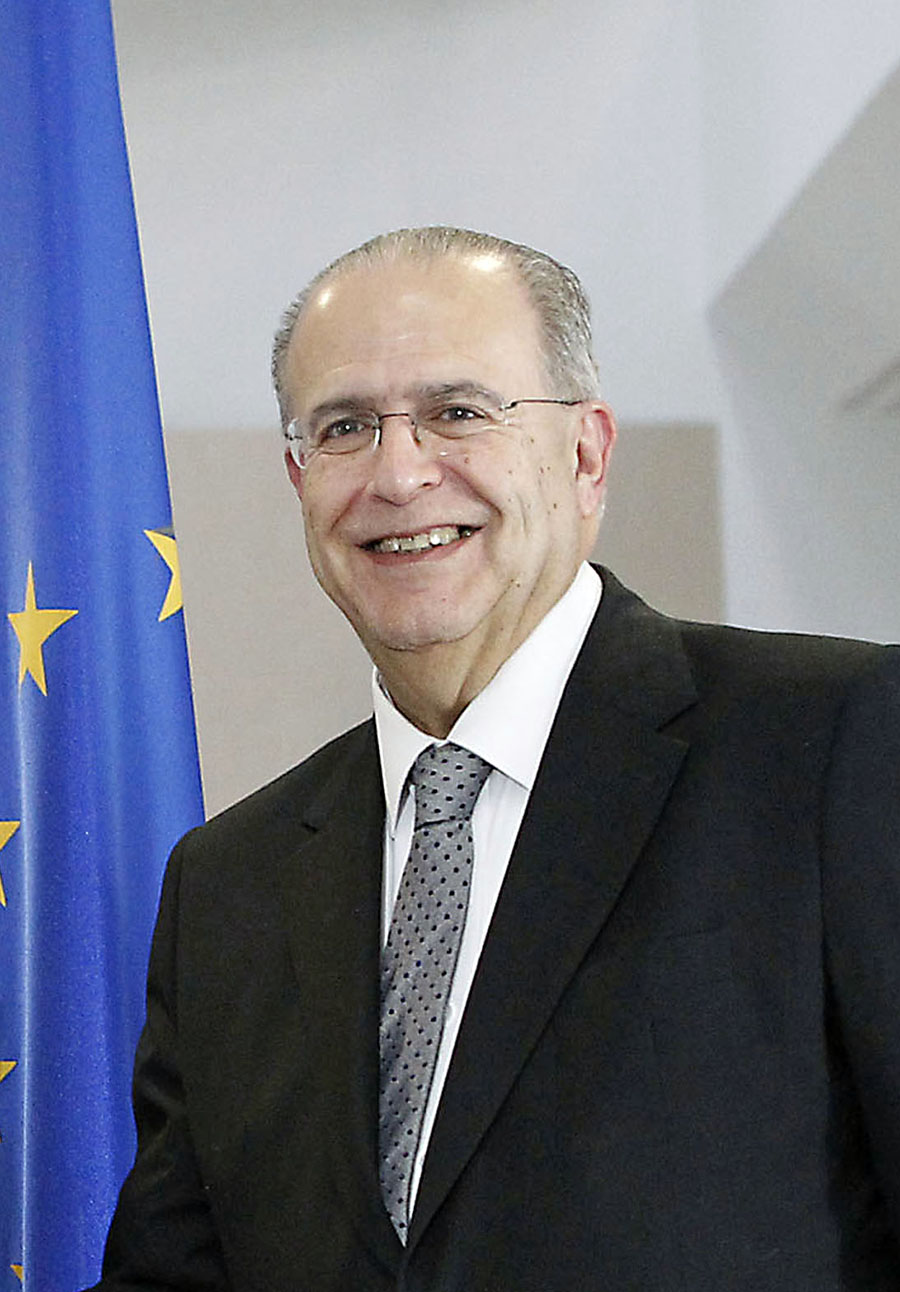 Συνάντηση Υπουργού Εξωτερικών κ. Ν. Κοτζιά με Υπουργό Εξωτερικών Κυπριακής Δημοκρατίας κ. Ι. Κασουλίδη στο πλαίσιο της επίσημης επίσκεψης του Πρωθυπουργού της Ελλάδας κ. Αλέξη Τσίπρα στη Λευκωσία, 2-3 Φεβρουαρίου 2015